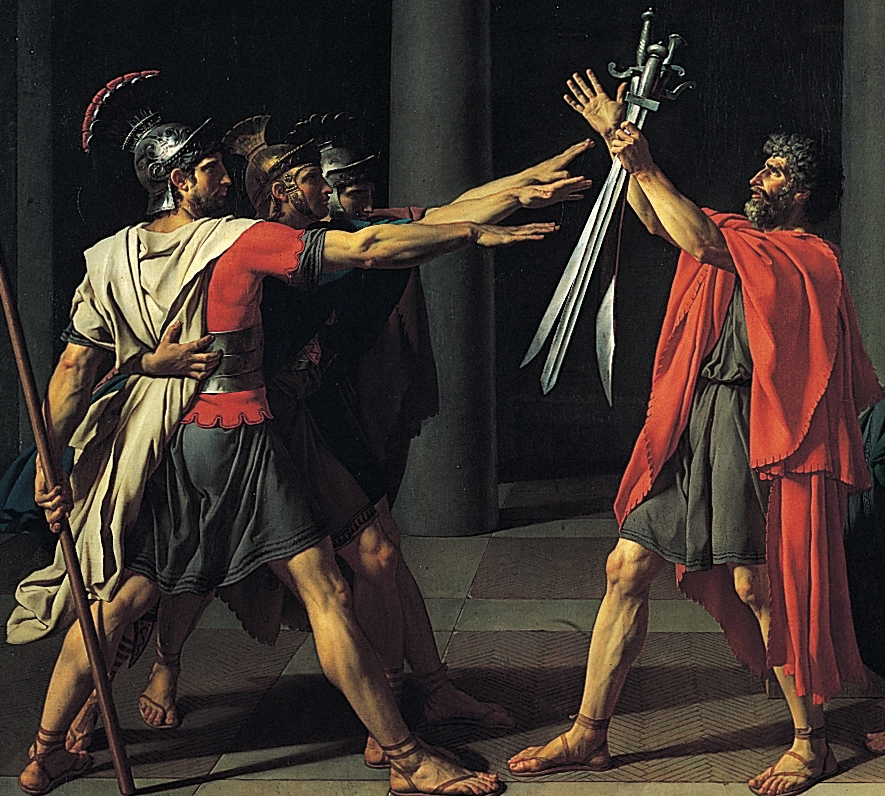 David, Le Serment des Horace (détail).